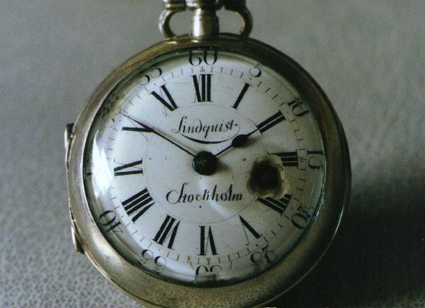 Ett Lindquist fickur från 1760